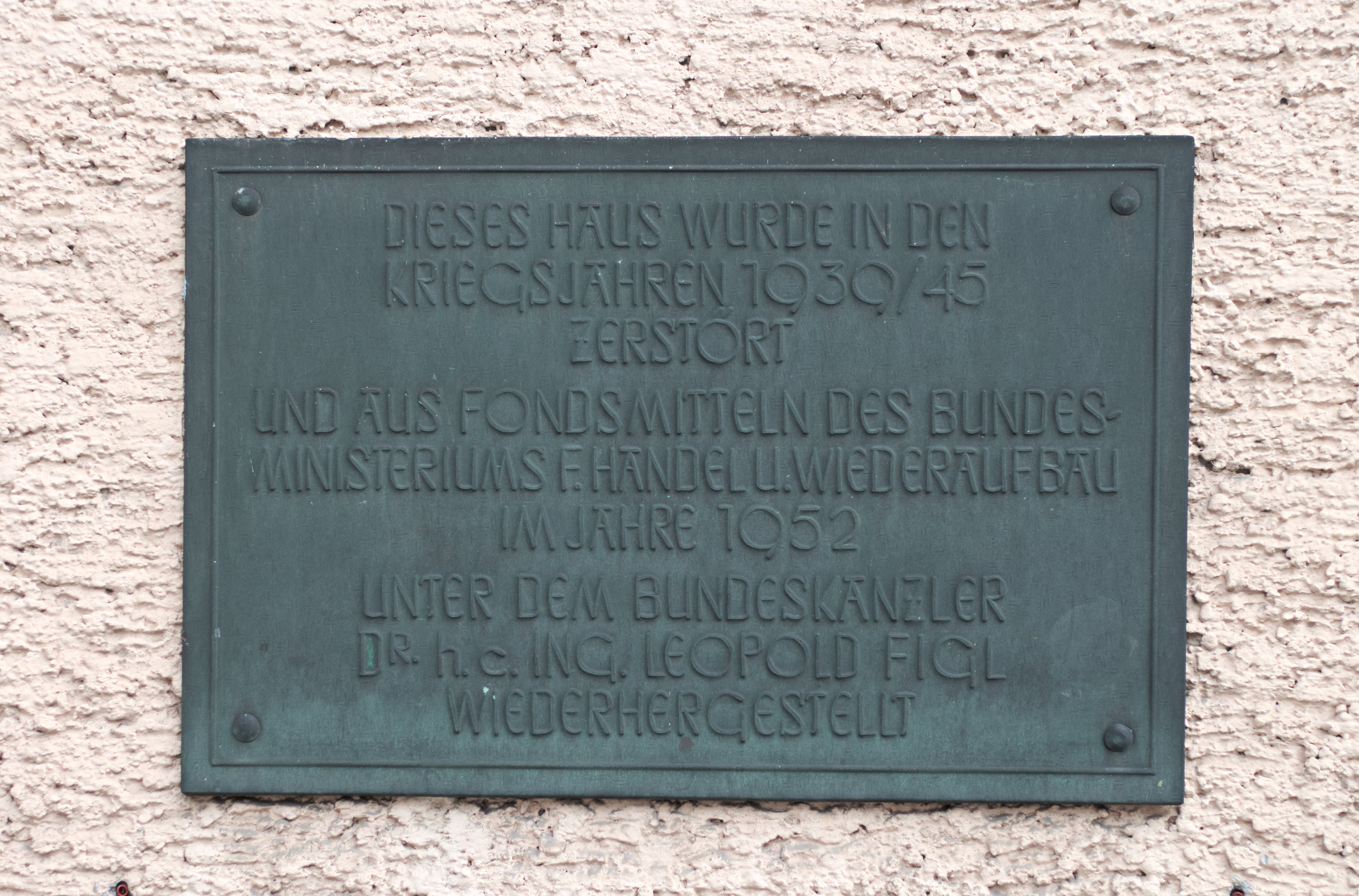 Tafel am Haus Elisabethstraße 47 im Salzburger Stadtteil Elisabeth-Vorstadt zur Baugeschichte des Hauses: DIESES HAUS WURDE IN DEN KRIEGSJAHREN 1939/45 ZERSTÖRT UND AUS FONDSMITTELN DES BUNDES- MINISTERIUMS F: HANDEL U: WIEDERAUFBAU IM JAHRE 1952 UNTER DEM BUNDESKNAZLER Dr. h. c. ING. LEOPOLD FIGL WIEDERHERGESTELLT